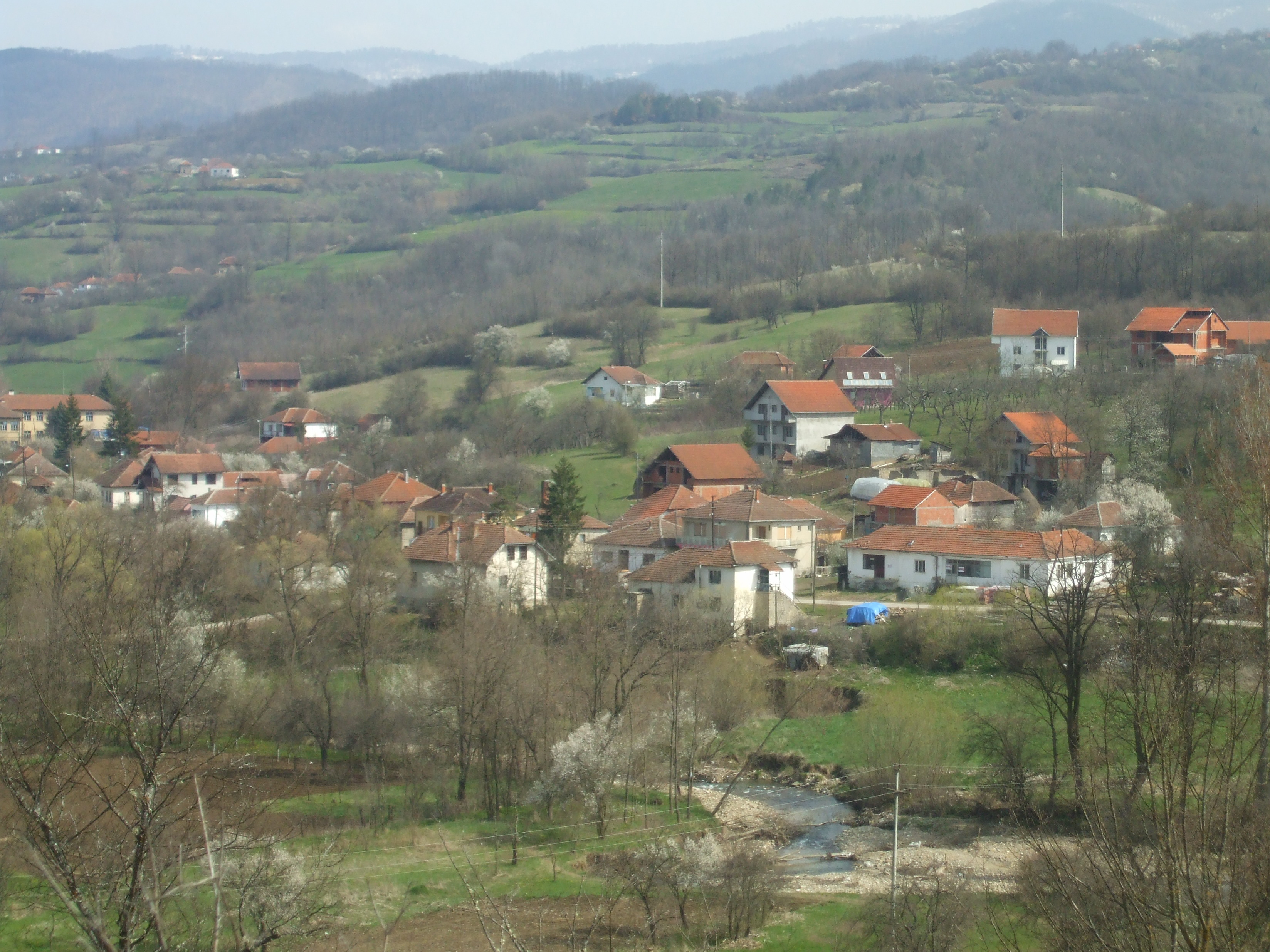 Панорама Власа, поглед са брда Велковица. Снимио Драгољуб. Види се центар села, од Задружног дома до Основне школе "20. октобар". У позадини је део села Градња, а на хоризонту обронци Кукавице.